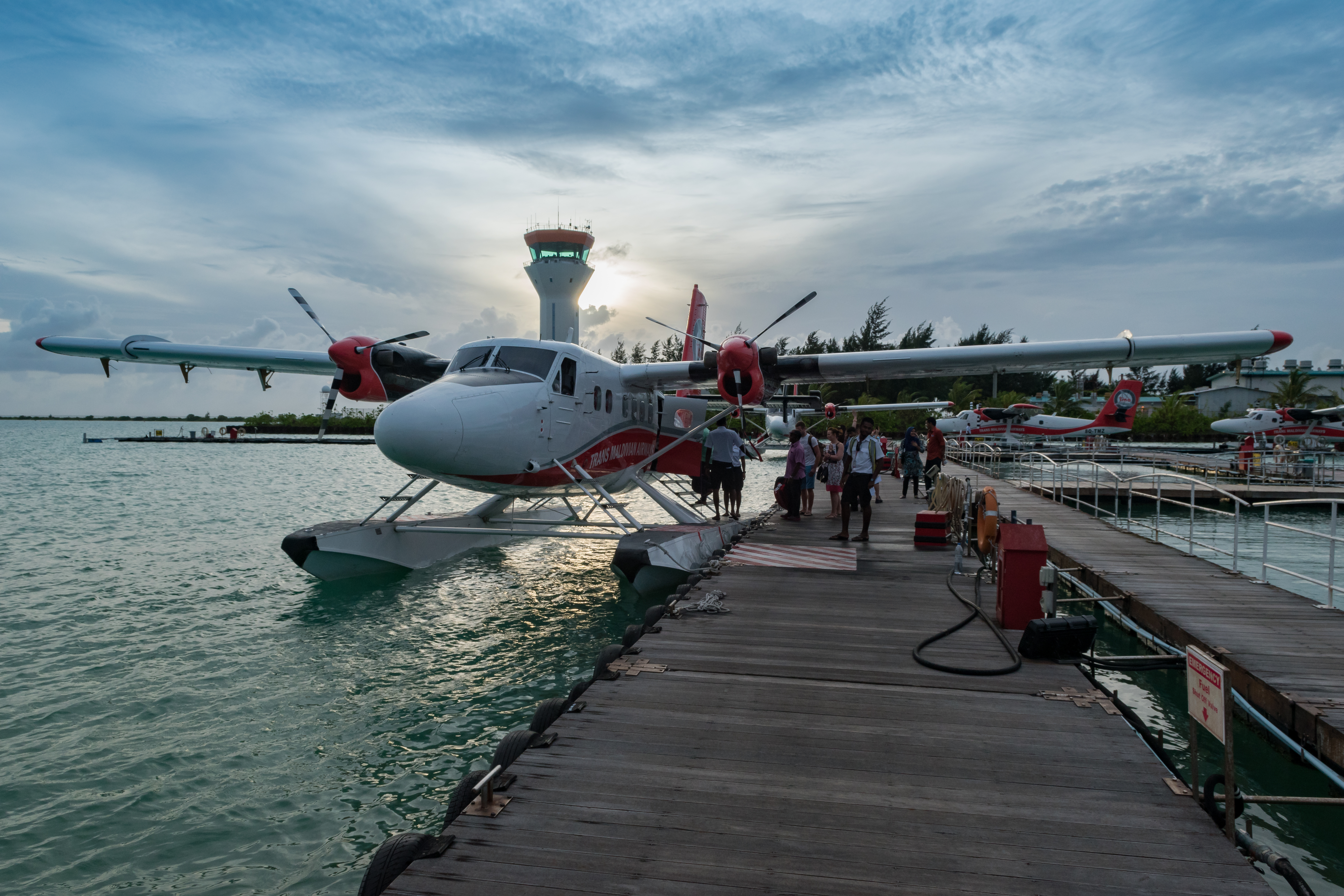 Wasserflugzeug Malediven Sonnenaufgang